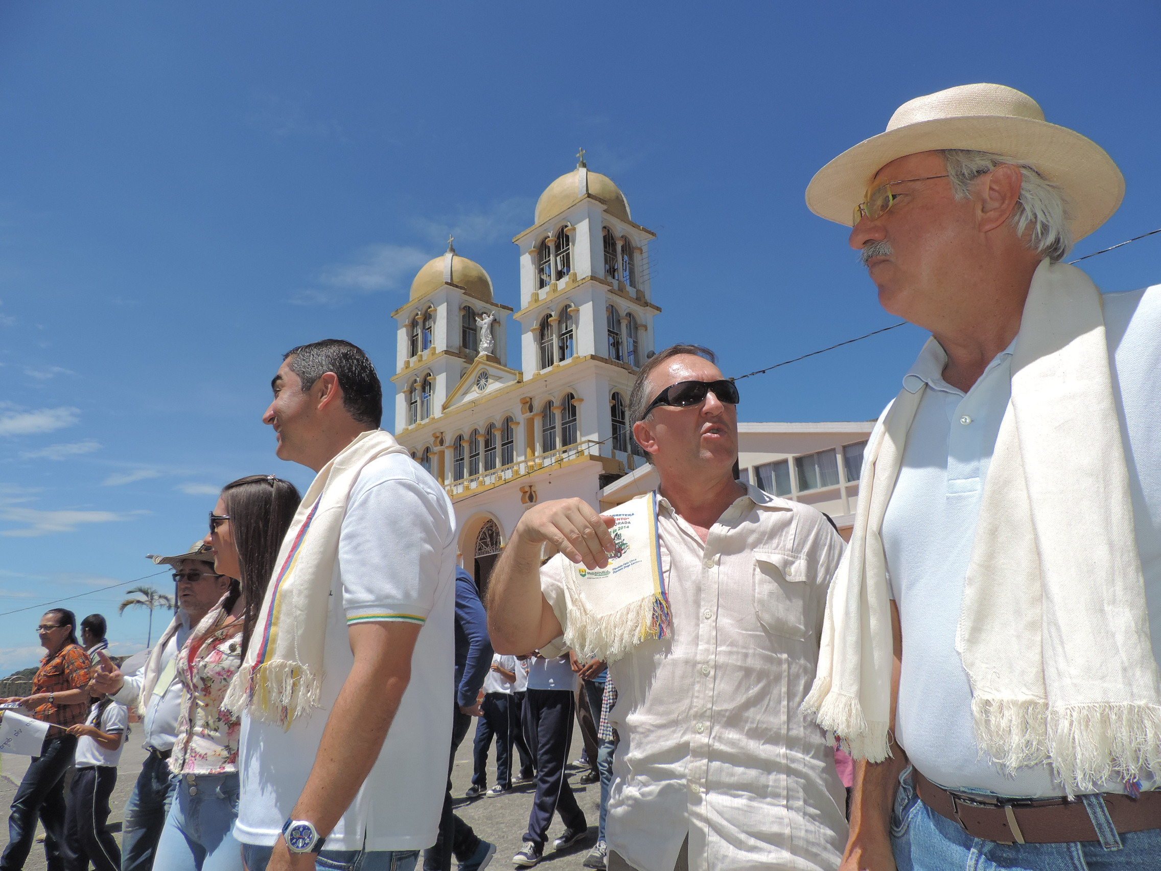 Julian Gutierrez Botero Gobernador